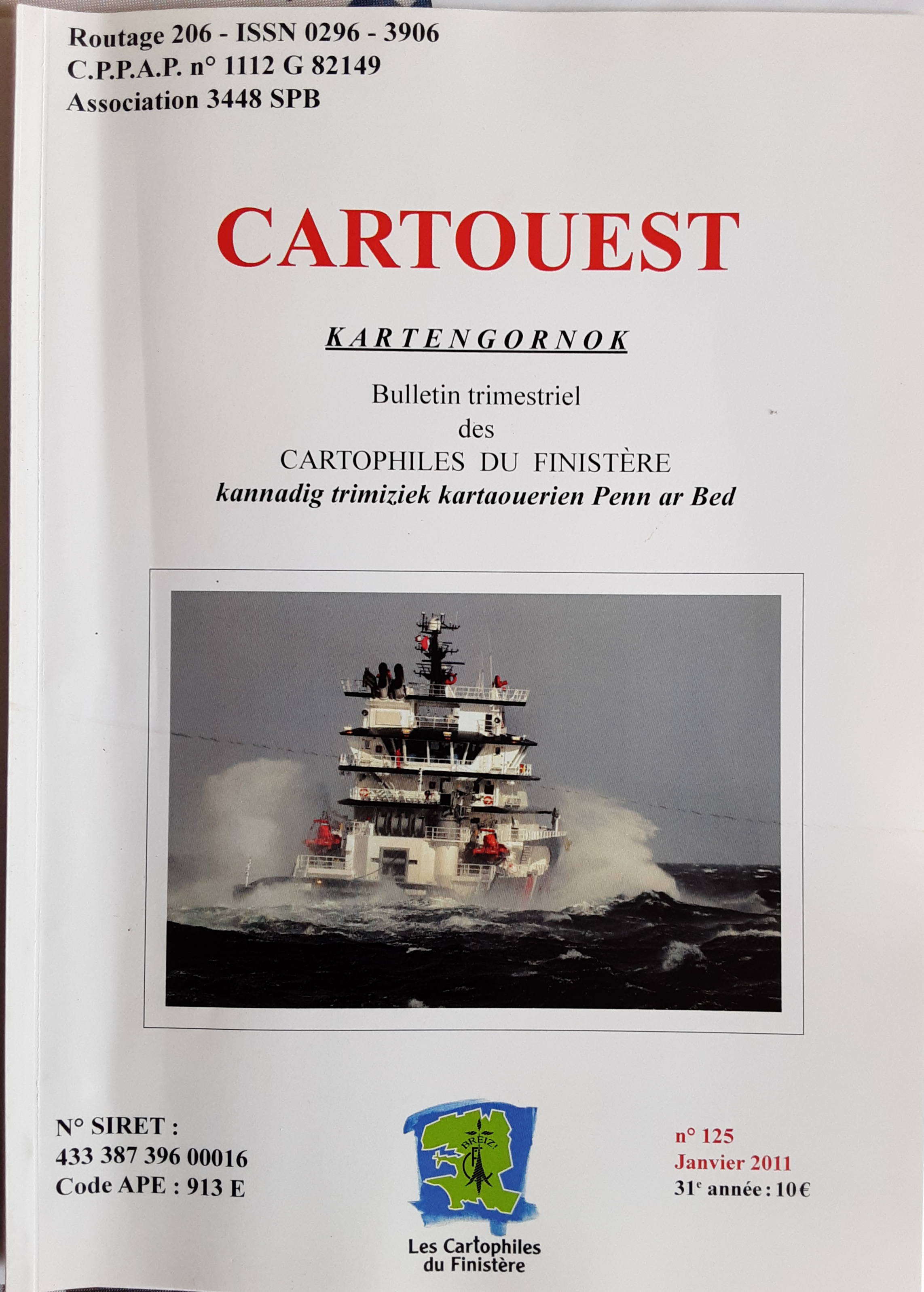 joel le bras